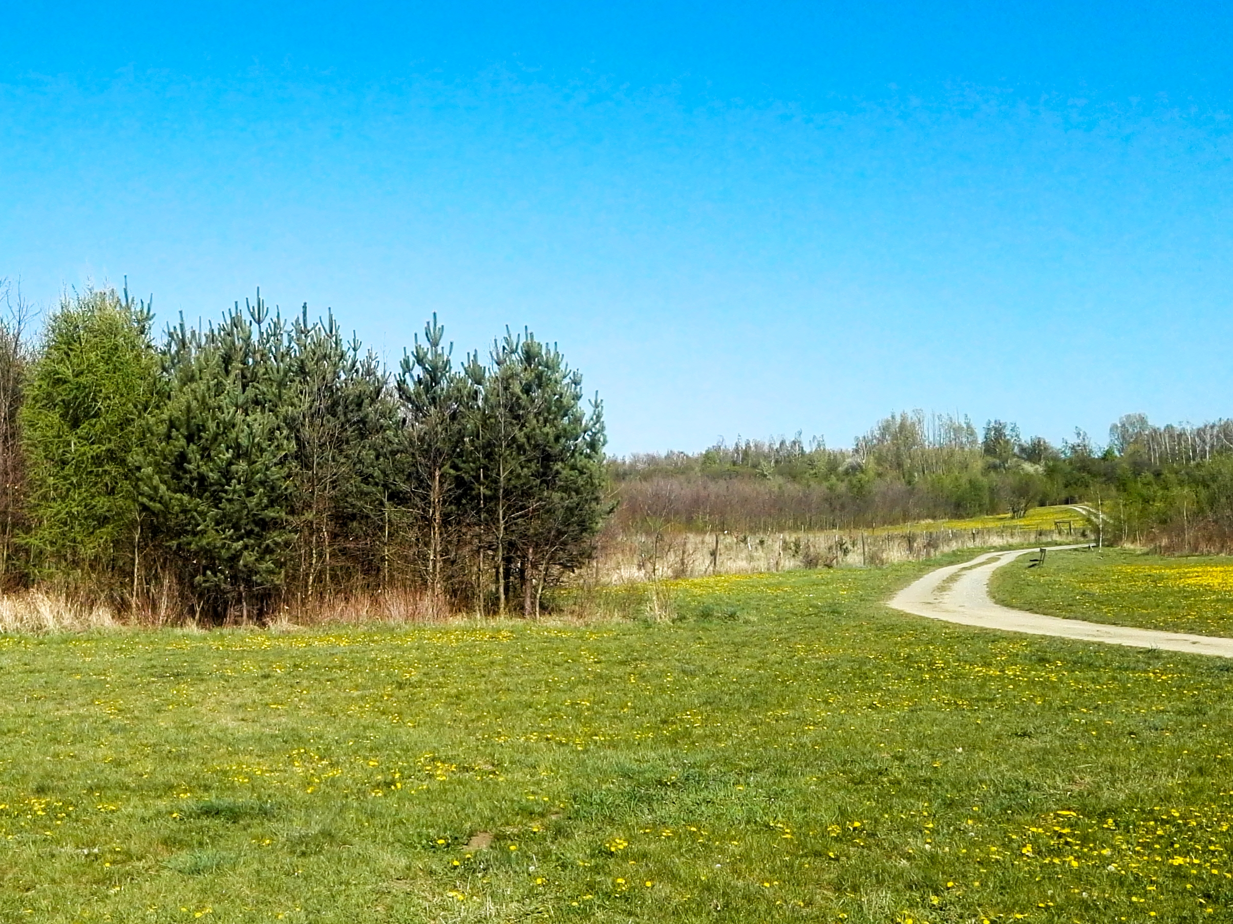 Lesopark Vinice v Praze-Běchovicích, cesta parkem kolem nových výsadeb